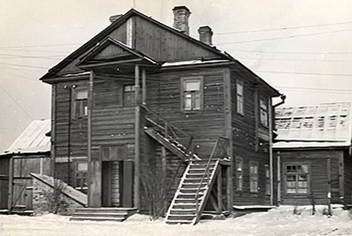 Беларуская (тарашкевіца): Менск (Miensk), Навінкі (Navinki). Псыханэўралягічная лякарня